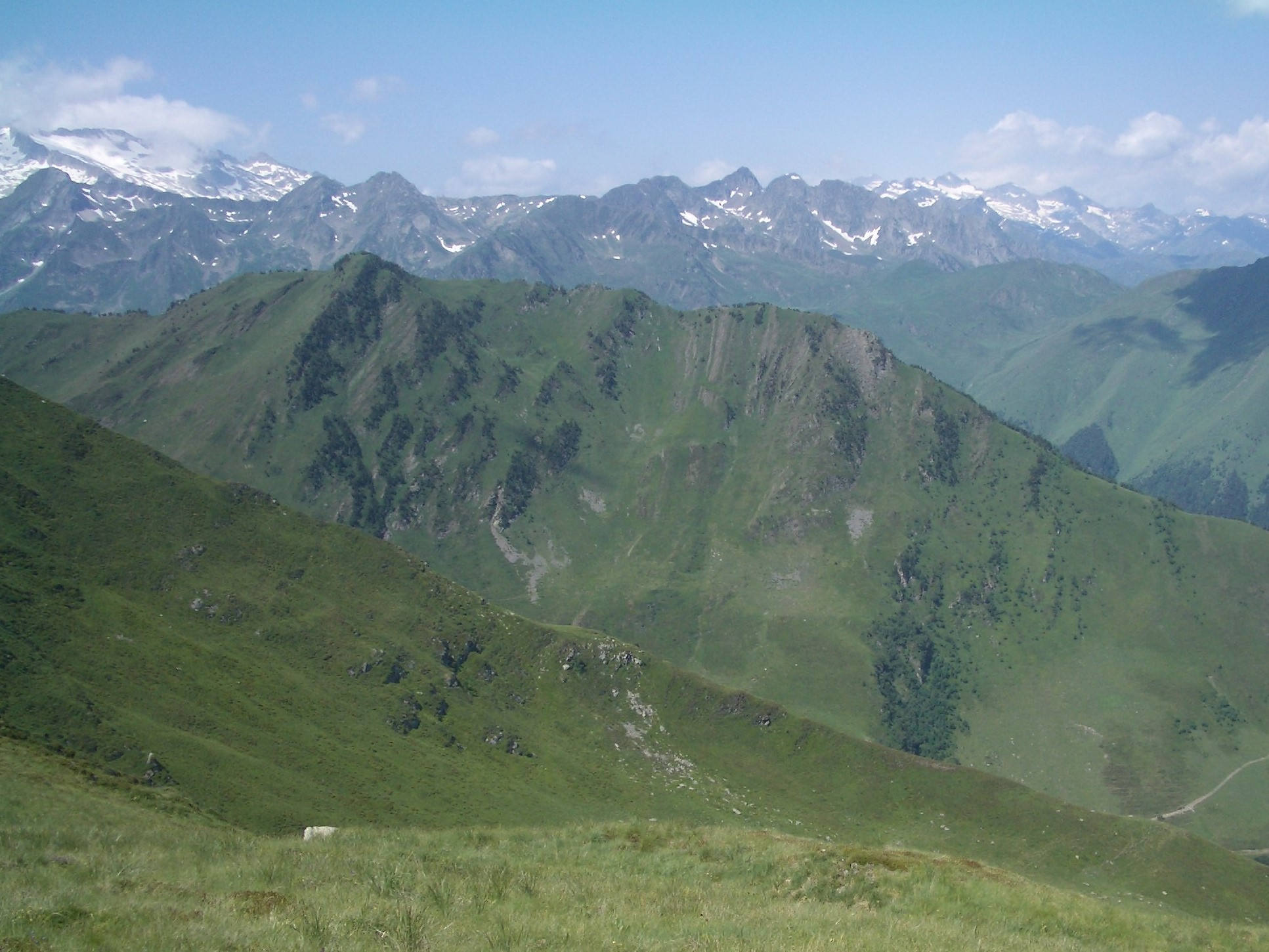 Vista del Tuc de Mieidia desde el Tuc de Montcorbison